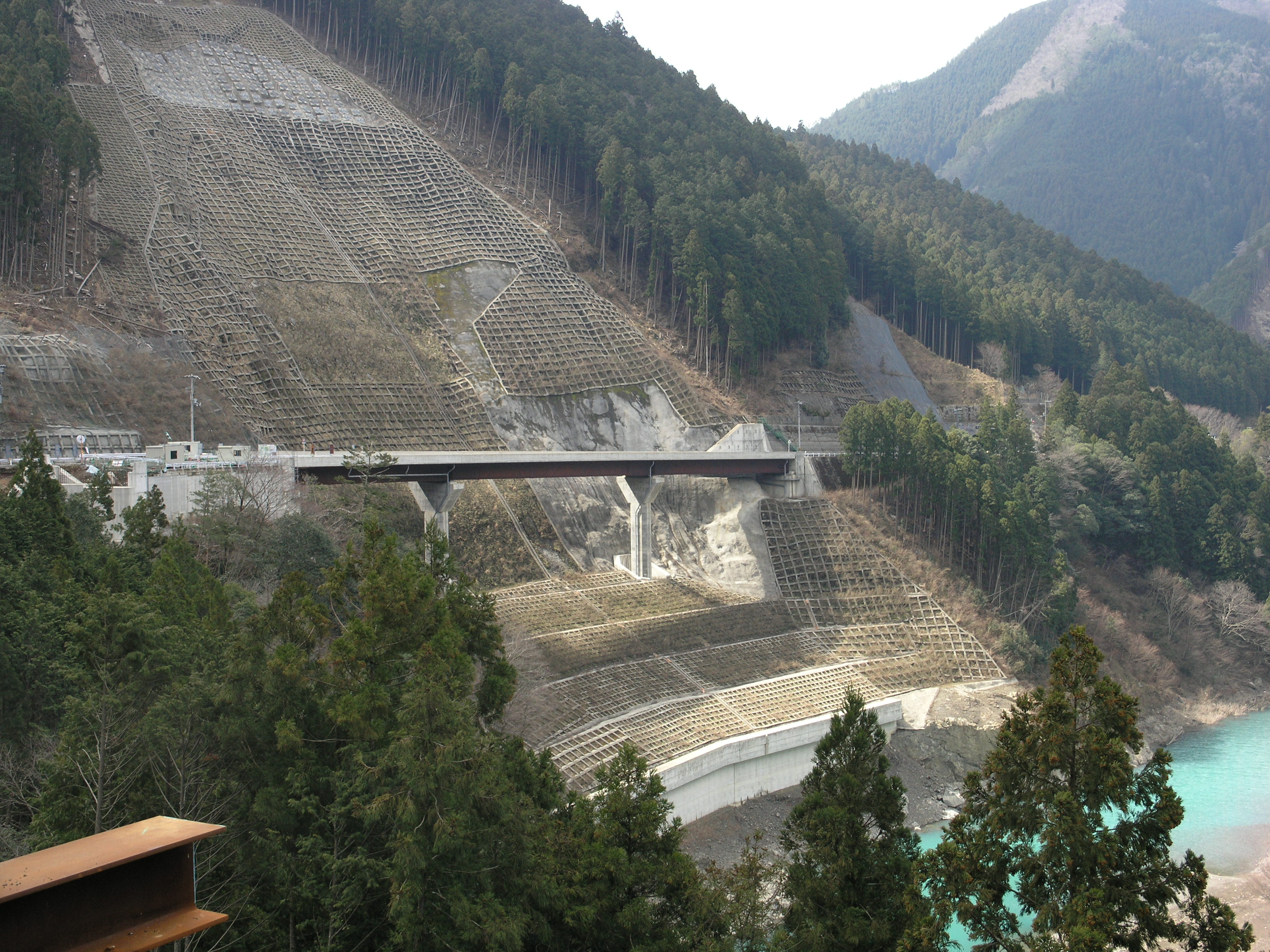 国道168号辻堂バイパス・新宇井橋 (奈良県五條市大塔町)